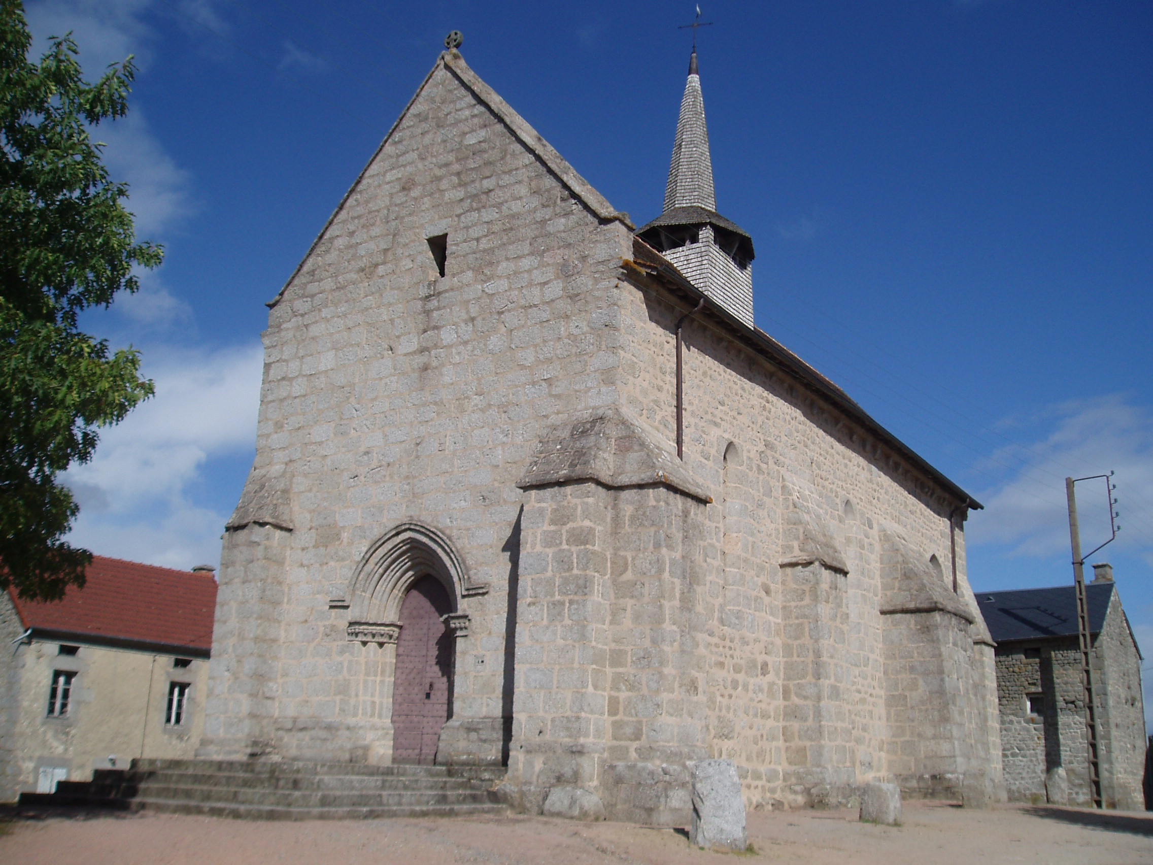 Église Saint-Thomas de Cantorbéry